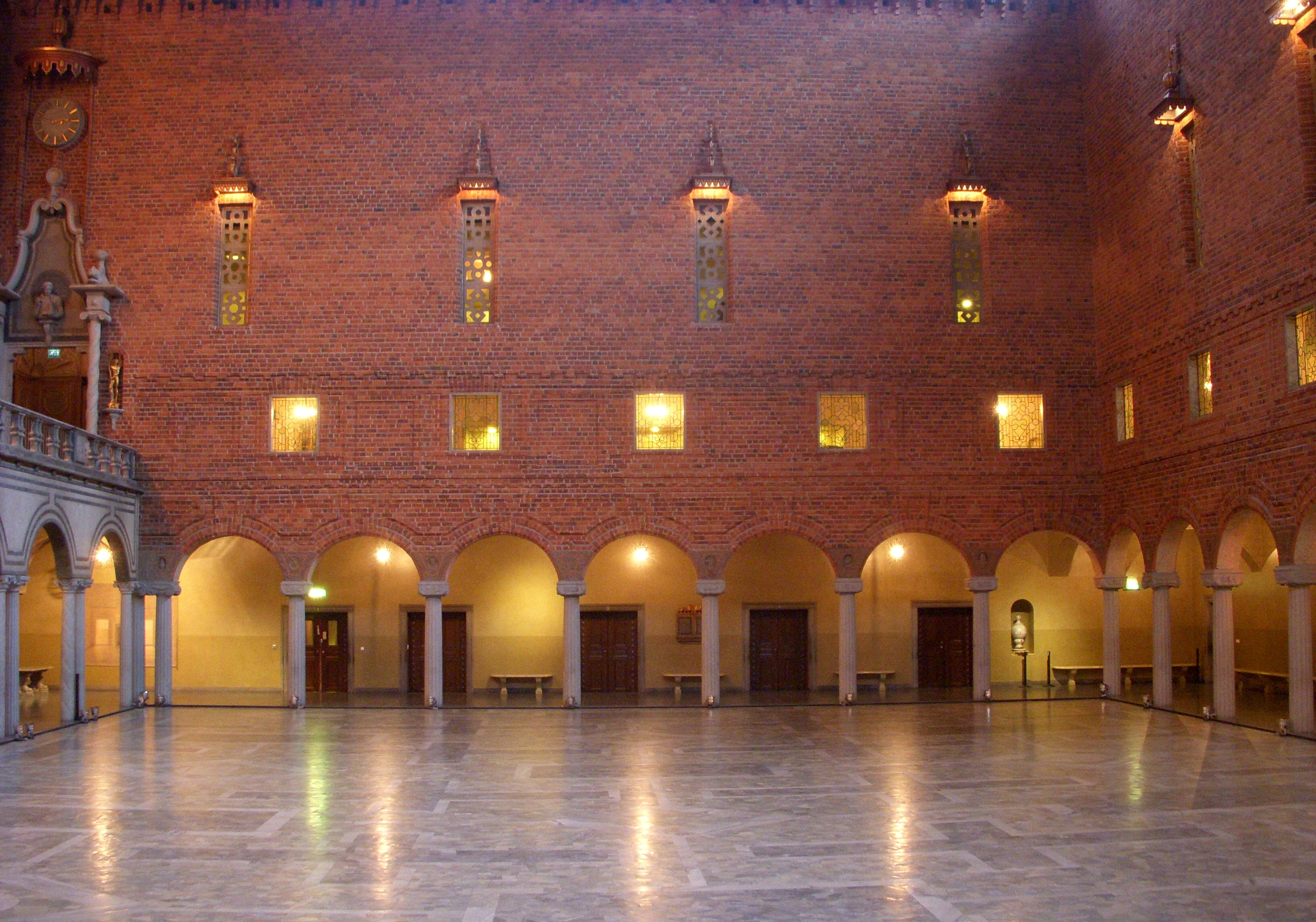 Stockholms stadshus, Blå hallen